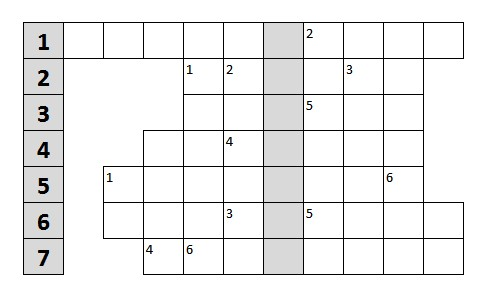 Voorbeeld van simpele filippine. De opgave luidt: welke stad zoeken we? Hints: 1: In deze stad vind je Pirates, Penguins, Phantoms en Panthers 2: In deze stad werd Alain de Botton geboren 3: Hier hoor je 't wel eens donderen 4: Stad van de Rangers en van Celtic 5: Volgens Wikipedia ligt deze stad op 52° 28' noorderbreedte en 4° 46' oosterlengte 6: De stad waar Gaudí zijn stempel op drukte 7: Hier werd Lleyton Hewitt geboren